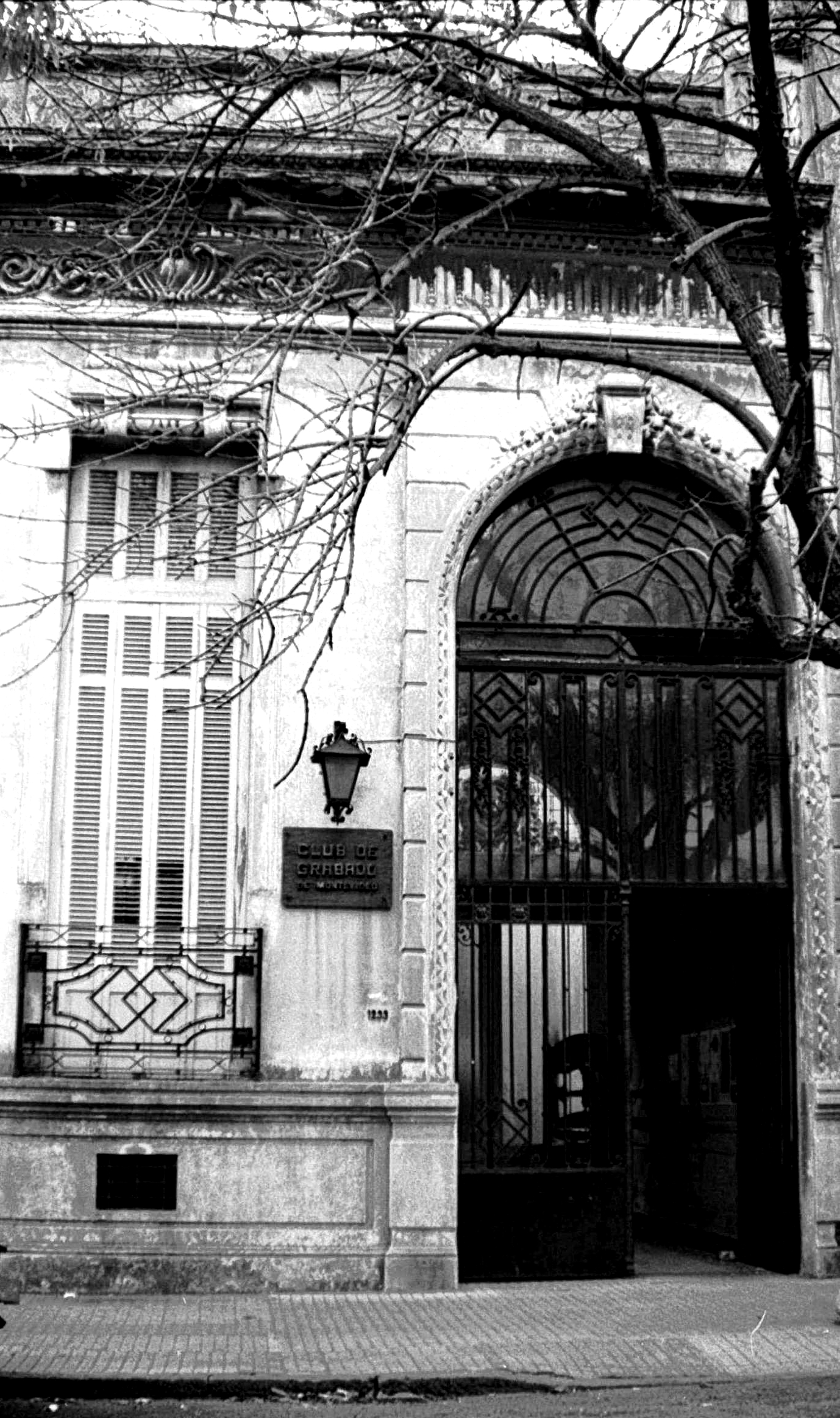 fachada de la sede de CLUB DE GRABADO DE MONTEVIDEO sita en la calle Paysandú 1233